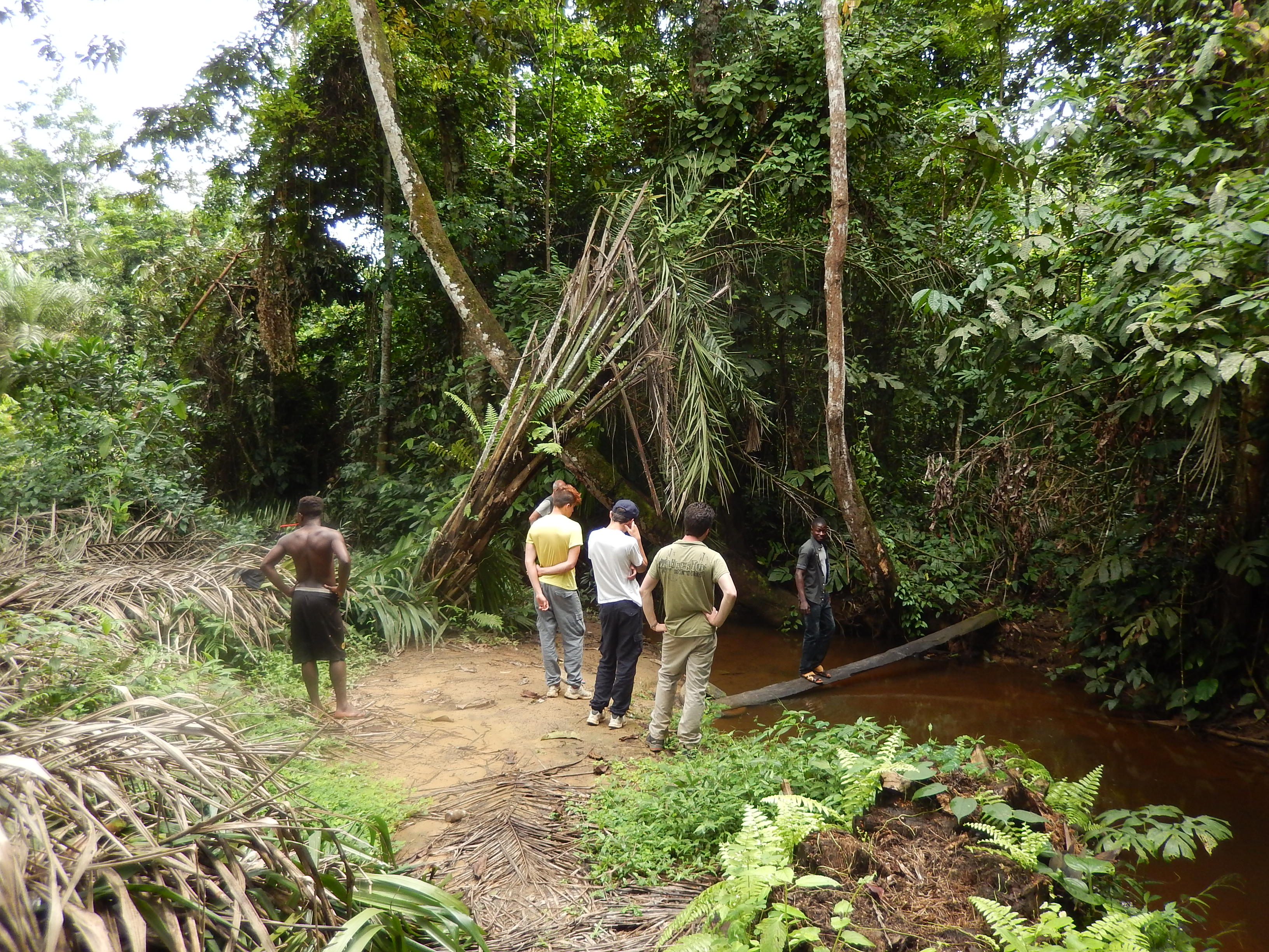 Découverte d'une zone rurale au Cameroun (Nyong-et-Kéllé). Traversée d'un ruisseau.